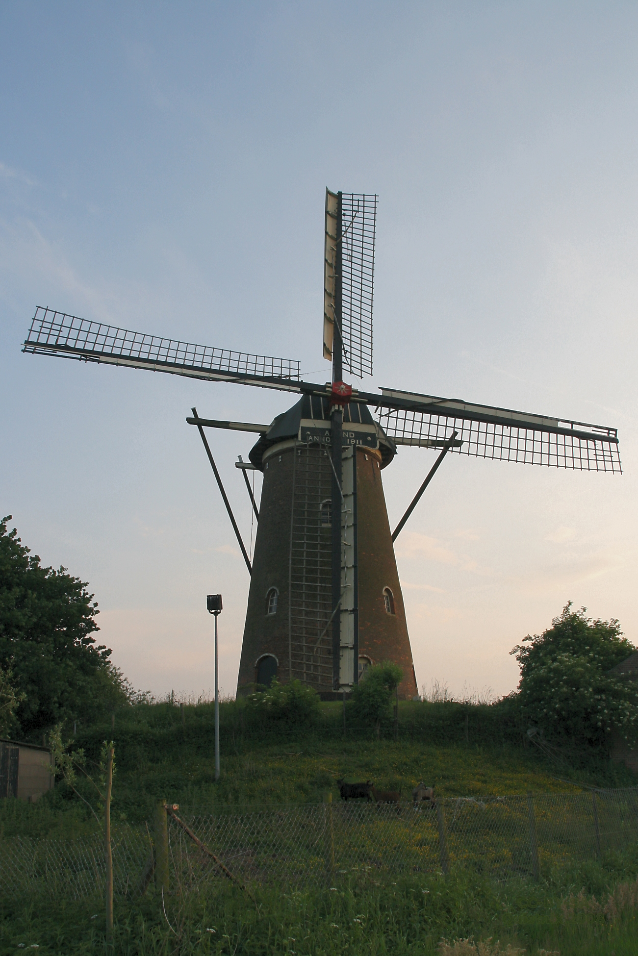 Wouw - molen De Arend